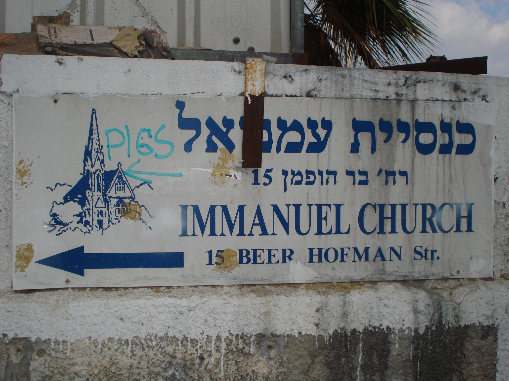 לקראת ביקורו של הקיסר הגרמני וילהלם השני ורעייתו בעת מסעם בארץ ישראל ב-1898, הונחה אבן הפינה לכנסייה ב-2 בנובמבר 1898 על ידי פרוטסטנטים מבין גולים מגרמניה ומשווייץ שגרו ביפו ועל ידי מומרים מזרמים נוצרים אחרים, רובם מומרים מקרב הטמפלרים.